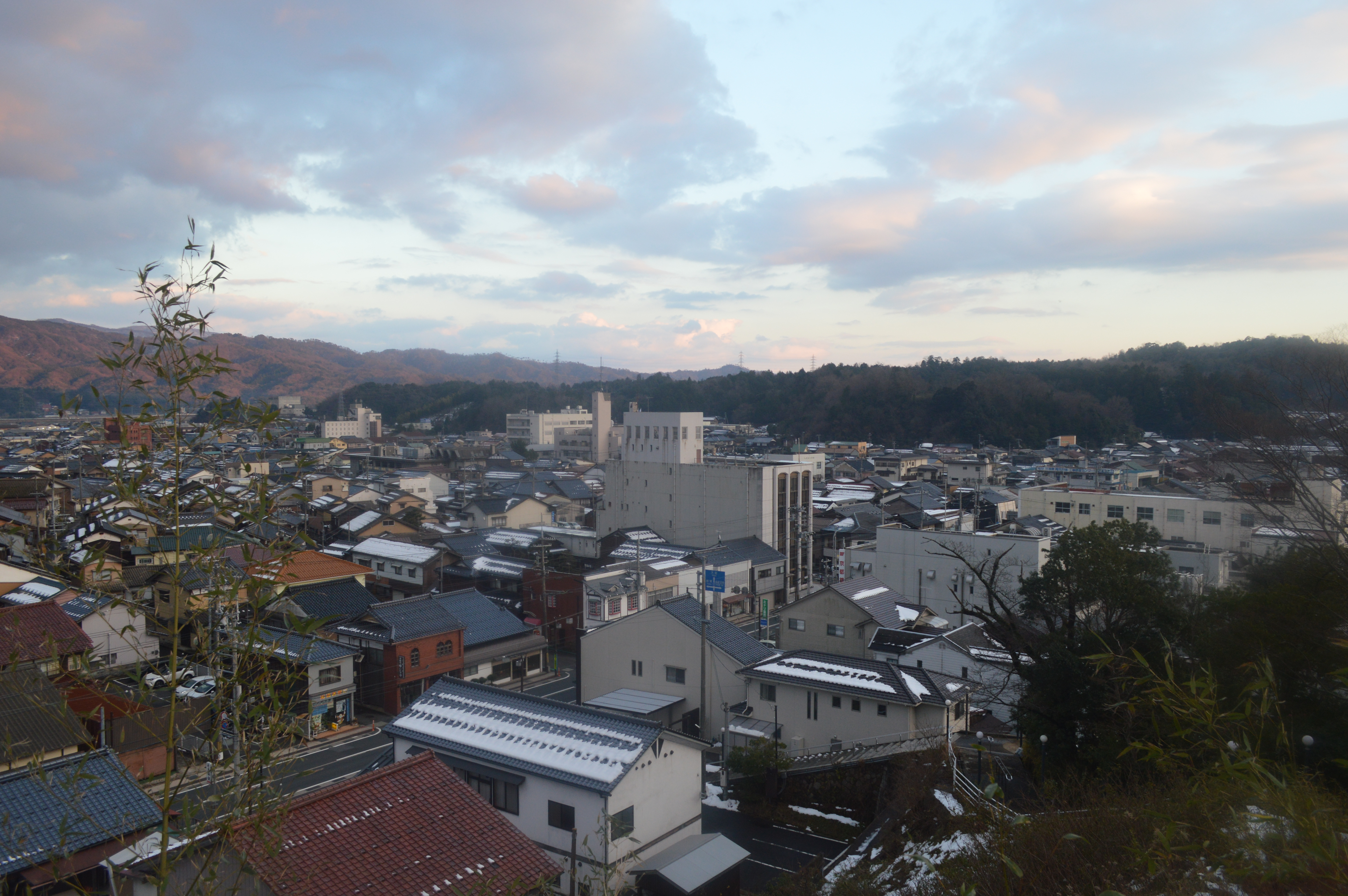 京都府京丹後市の峰山市街地。